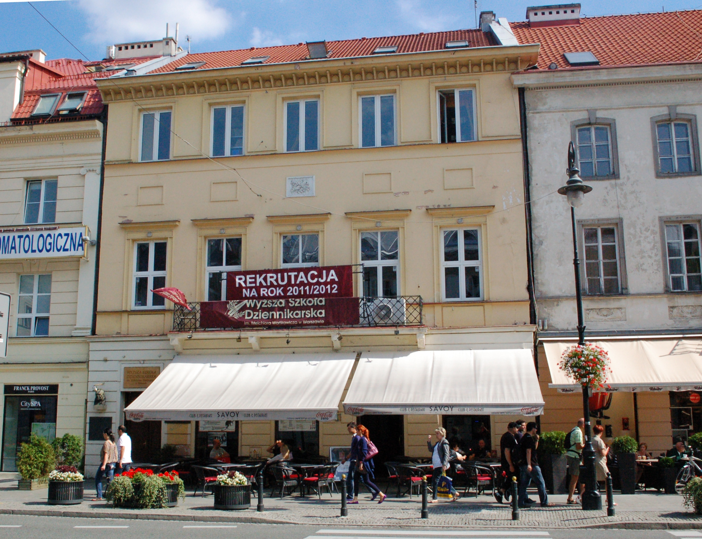 Former Hotel Savoy, Nowy Swiat, Warsaw